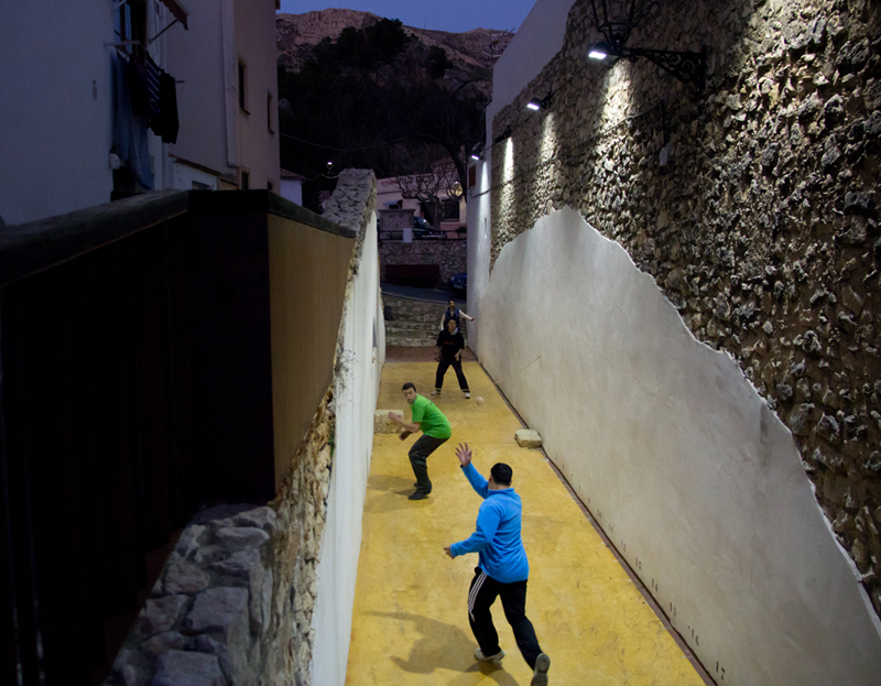 Imagen de una partida de 'pilota grossa' en el trinquet de Abdet